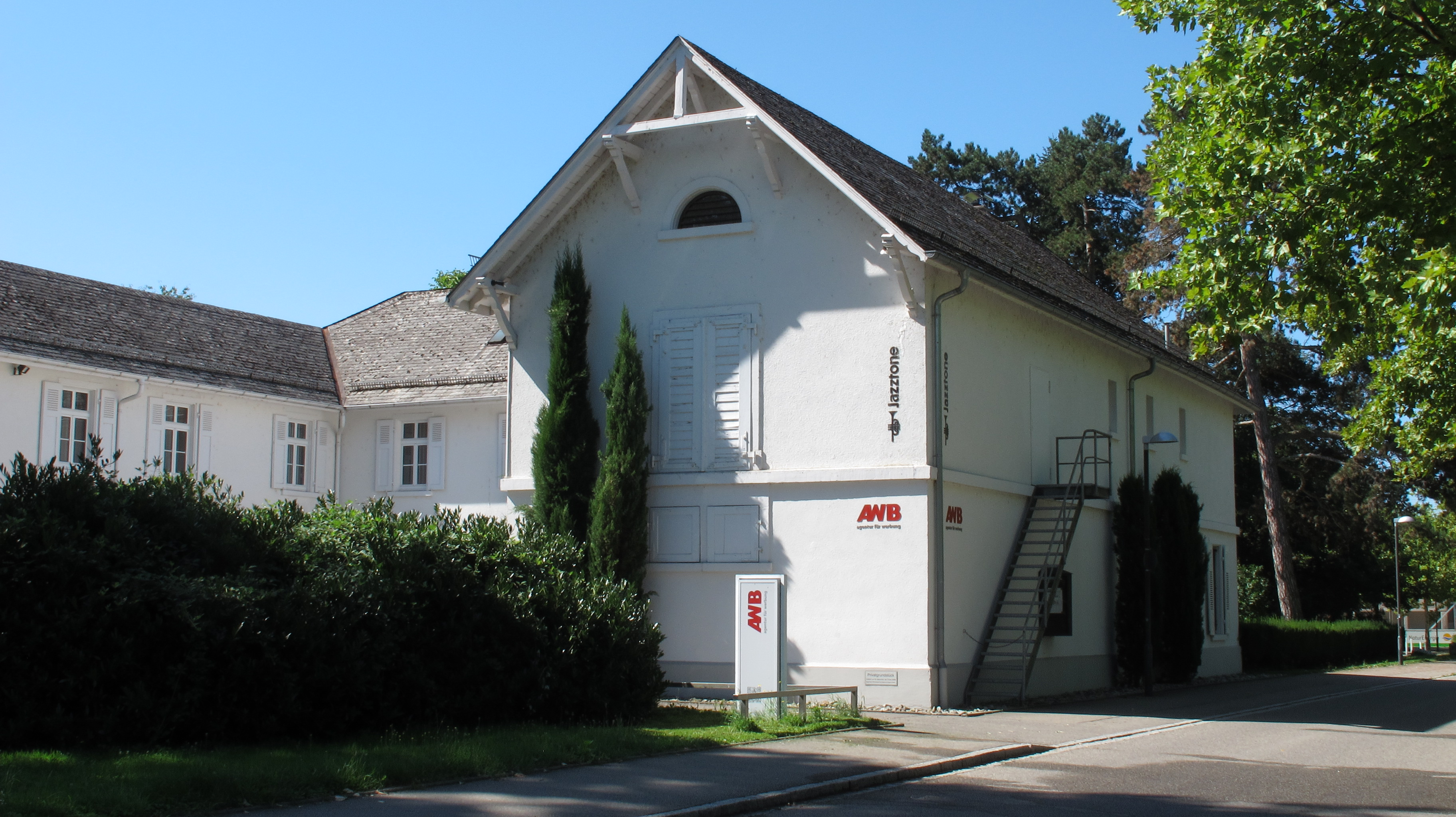 Jazztone Lörrach Clublokal Außenansicht